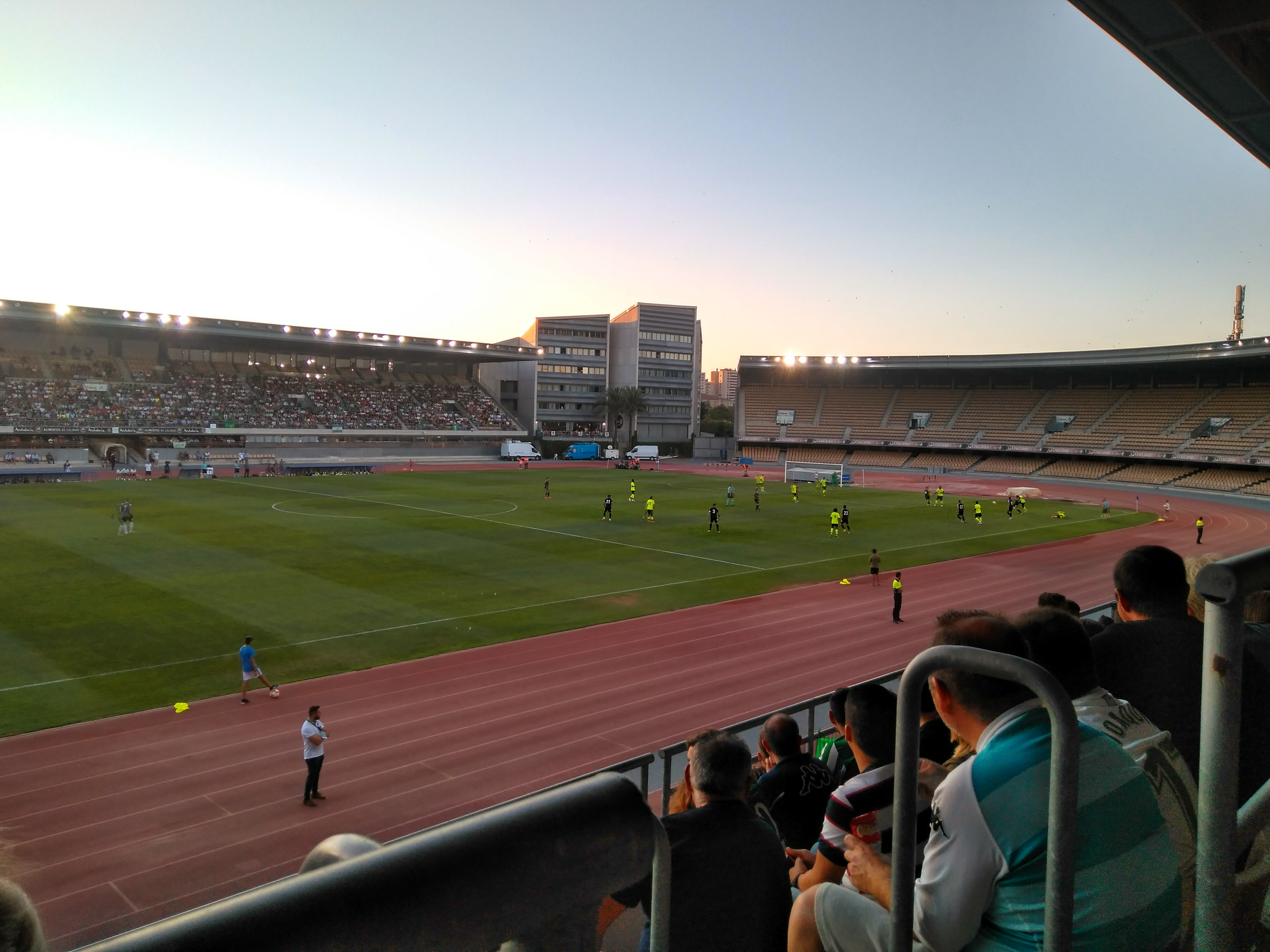 Partido amistoso entre el Betis y Lille en el Estadio Municipal de Chapín, Jerez de la Frontera (Andalucía, España)